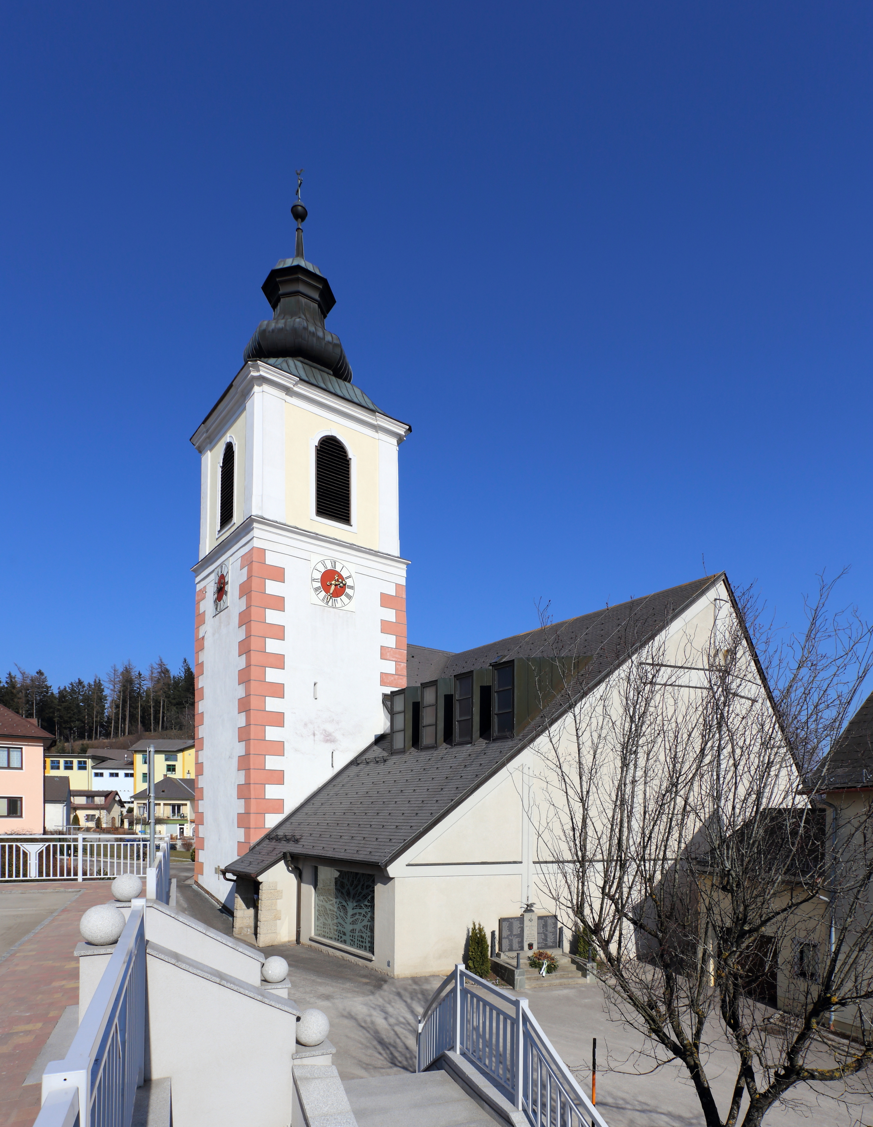 Südwestansicht der Pfarrkirche hl. Bartholomäus in Hochneukirchen, ein Ortsteil der niederösterreichischen Marktgemeinde Hochneukirchen-Gschaidt. Eine ehemalige Wehrkirche mit einer Kernsubstanz um 1300. Ende des 15. Jahrhundert erfolgte ein Ausbau der Wehrkirche. 1787 wurde die Kirche umgebaut und der Ostturm abgetragen. Der moderne Zubau im Süden wurde 1982/83 nach Plänen Hans Petermair errichtet.